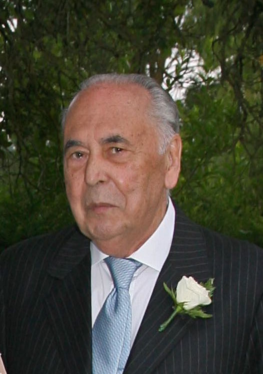 Carlos Varela Rodríguez